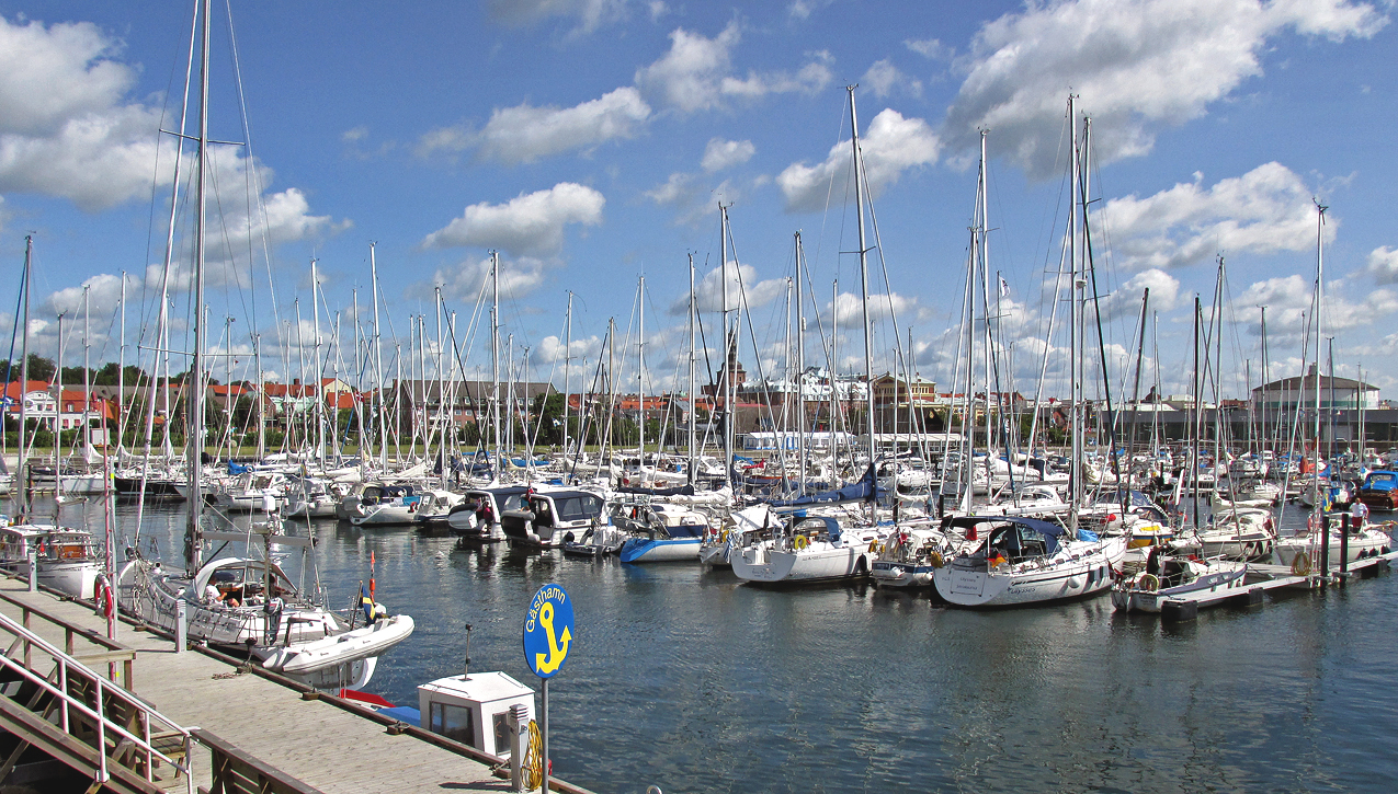 Gästhamnen i Ystad 8 Juli 2015.